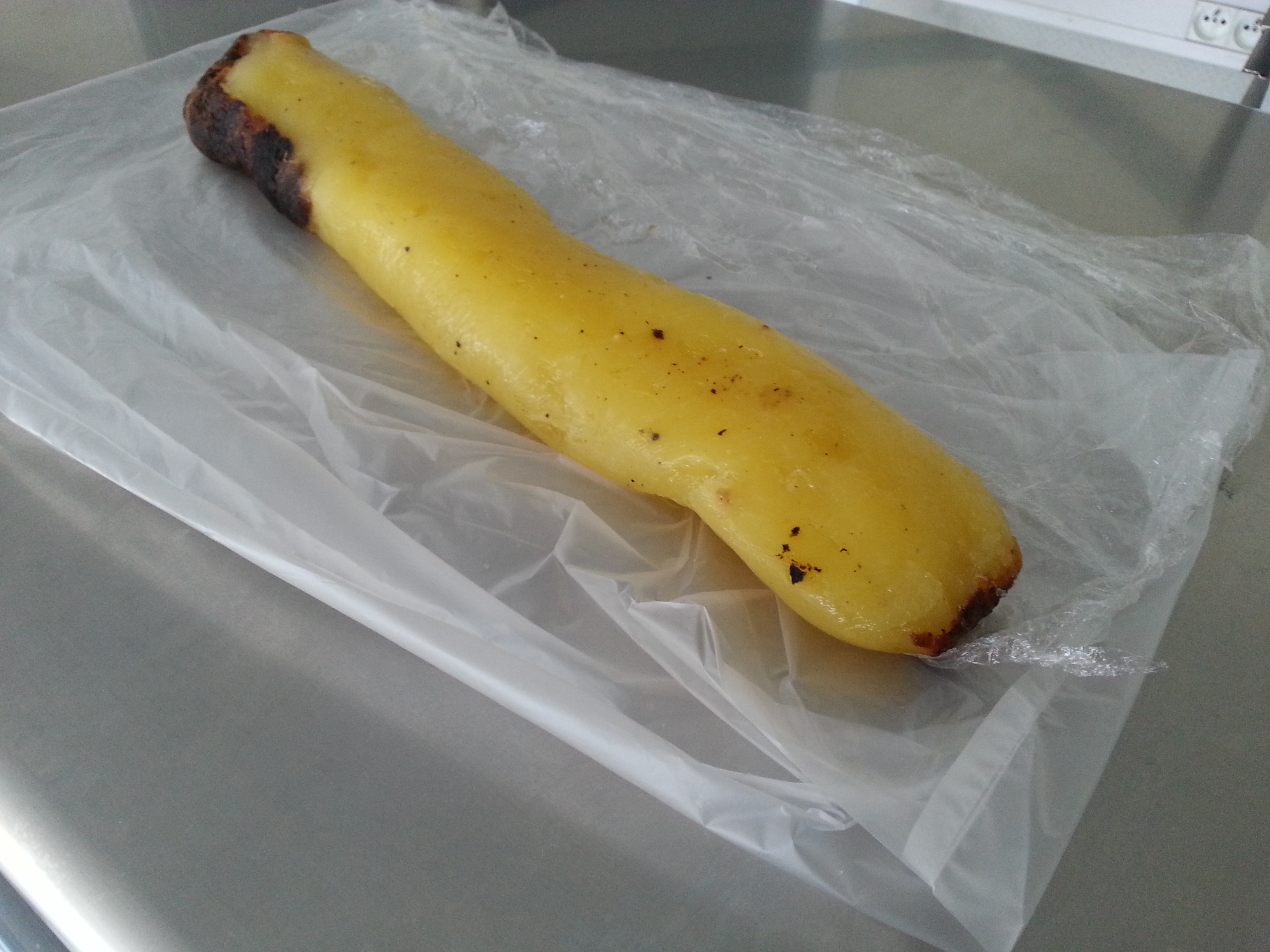 Tāota particulièrement long acheté au marché de Papeete